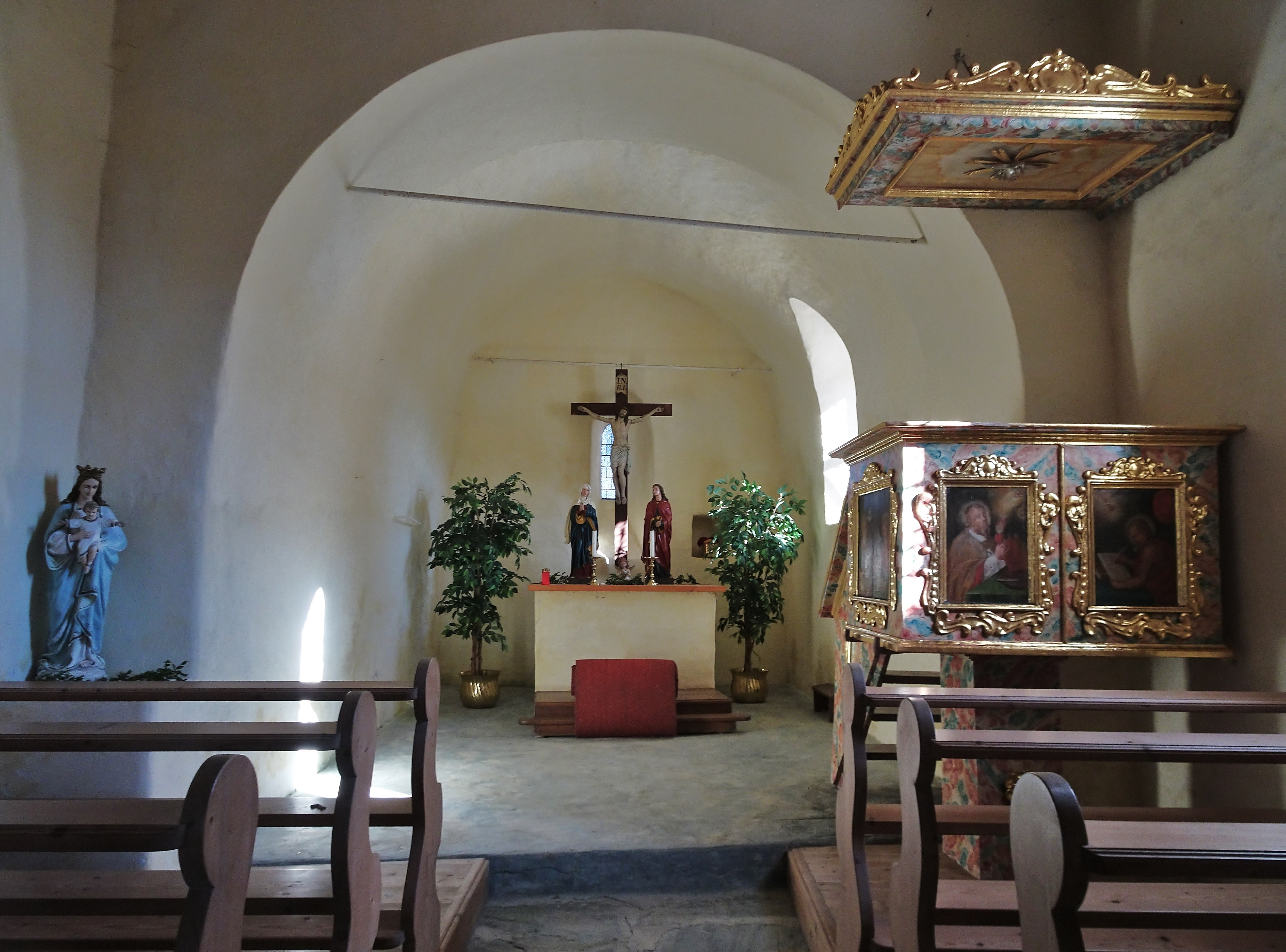 Kath. Filialkirche Wasai, Innenansicht